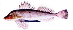 Testolín.